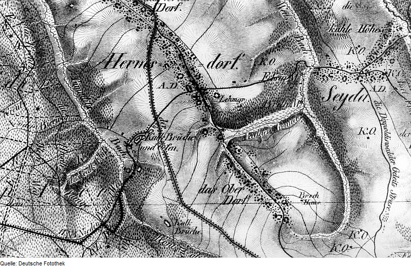 Original image description from the Deutsche FotothekHermsdorf/Erzgeb.-Seyde. Oberreit, Sect. Altenberg, 1821